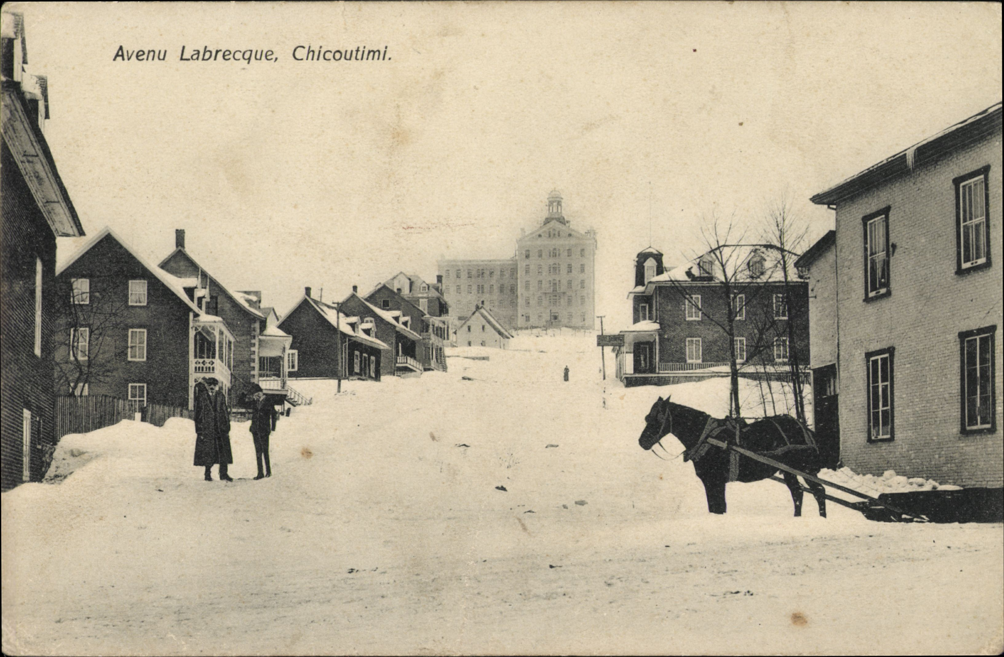 Avenue Labrecque, Chicoutimi, carte postale, Éd. J.A Coté